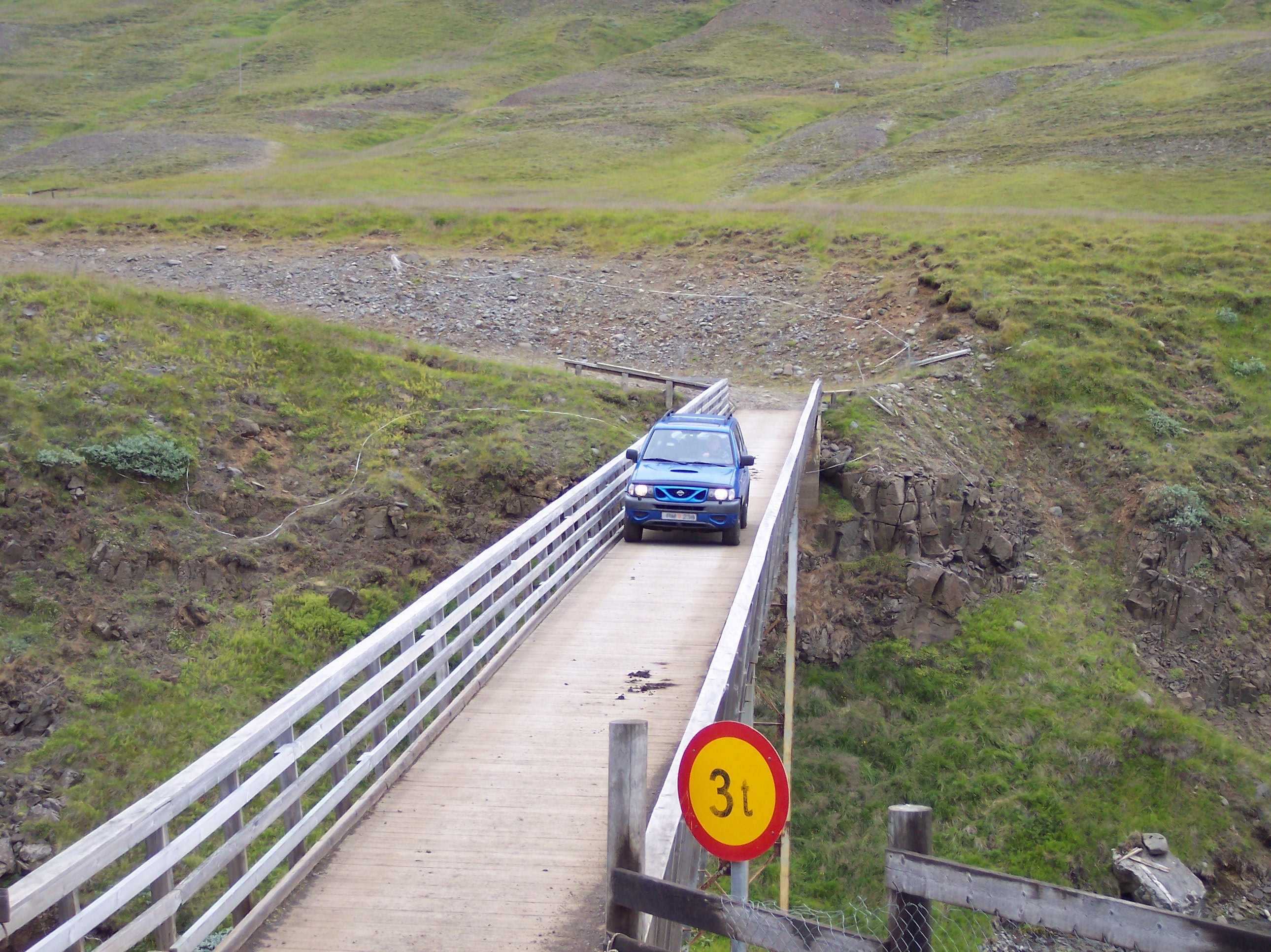 Austurdalur, Iceland.